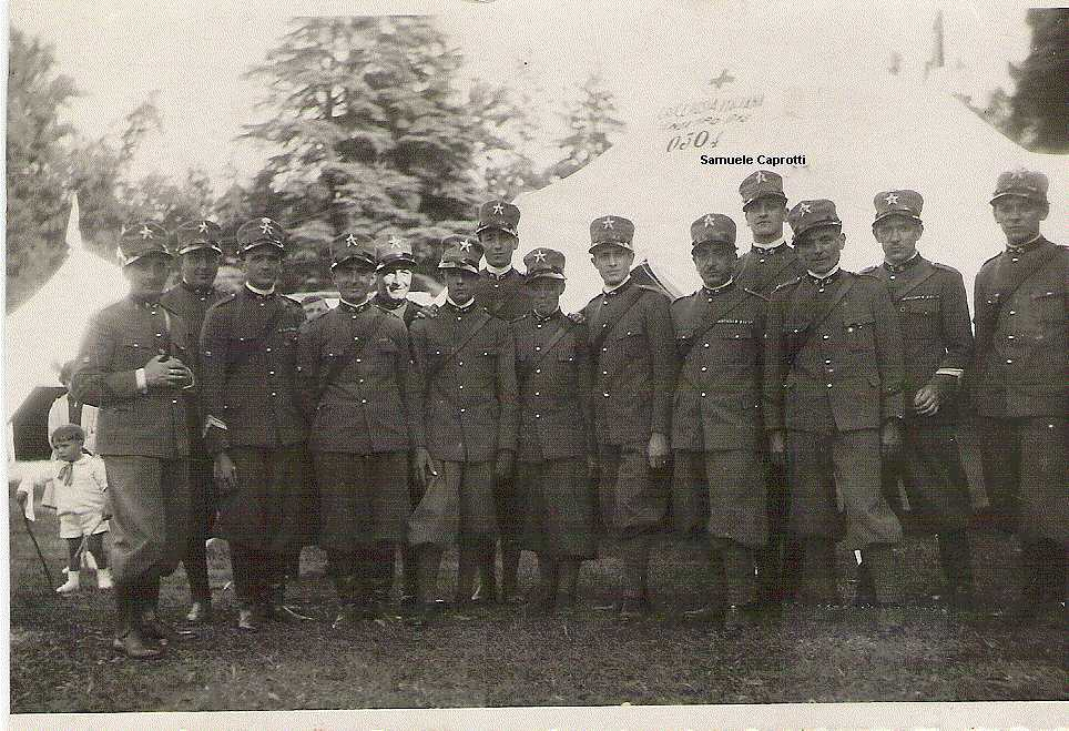 Sezione sanità militare italiana